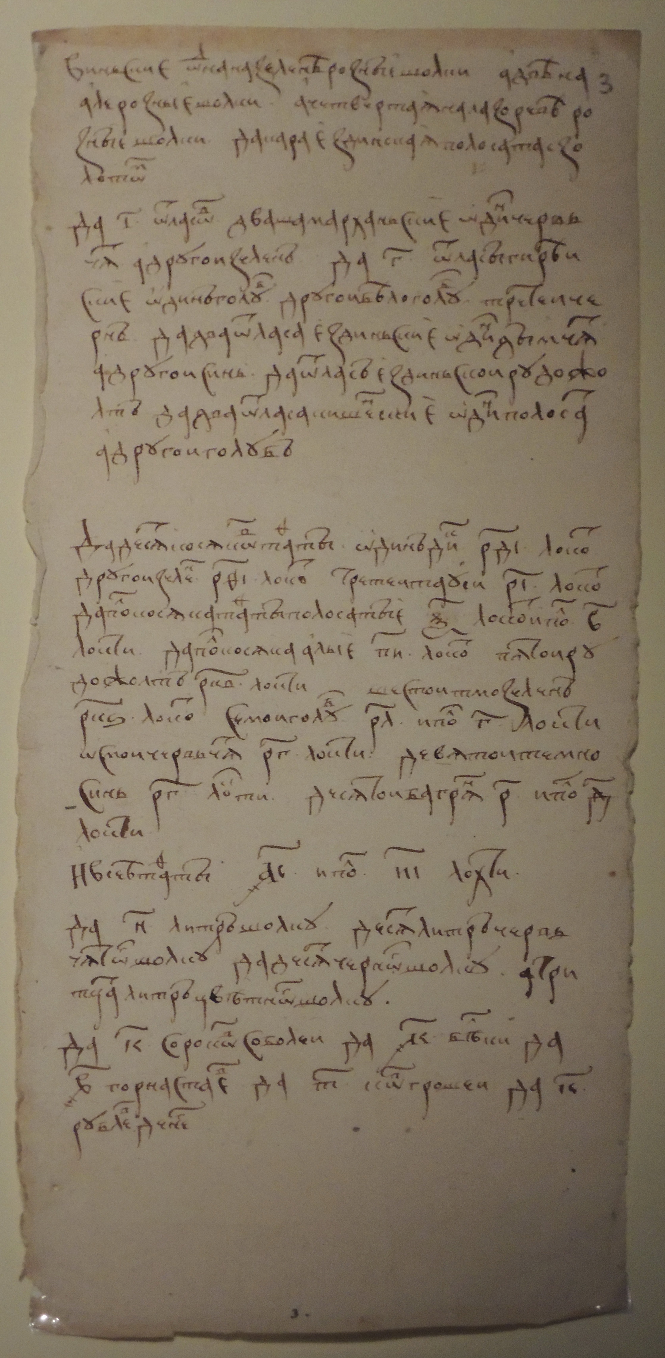 Выставка "Великий князь и государь всея Руси Иван III"